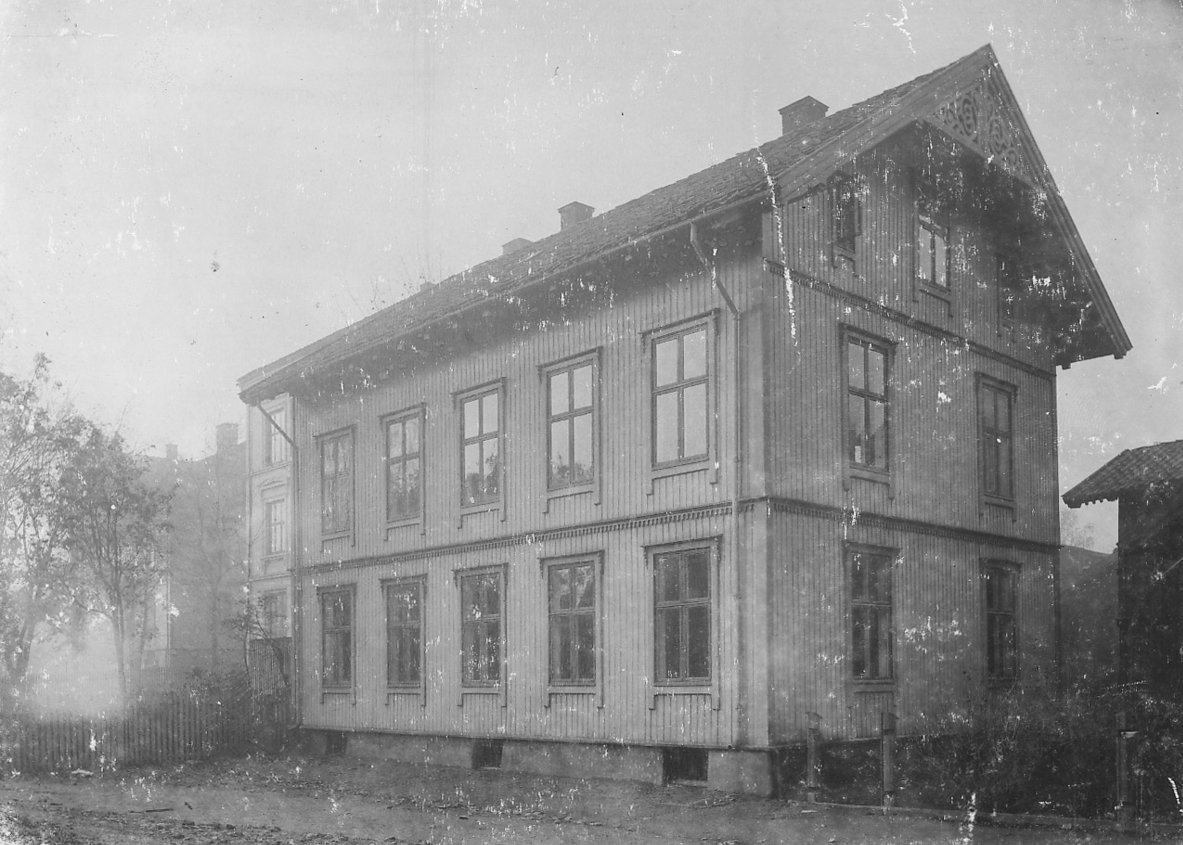 Bogstadveien 24, revet 19. oktober 1899 for å gi plass til nåværende murgård. Ukjent fotograf, ca. 1899. Fra Byhistorisk samling hos Oslo Museum